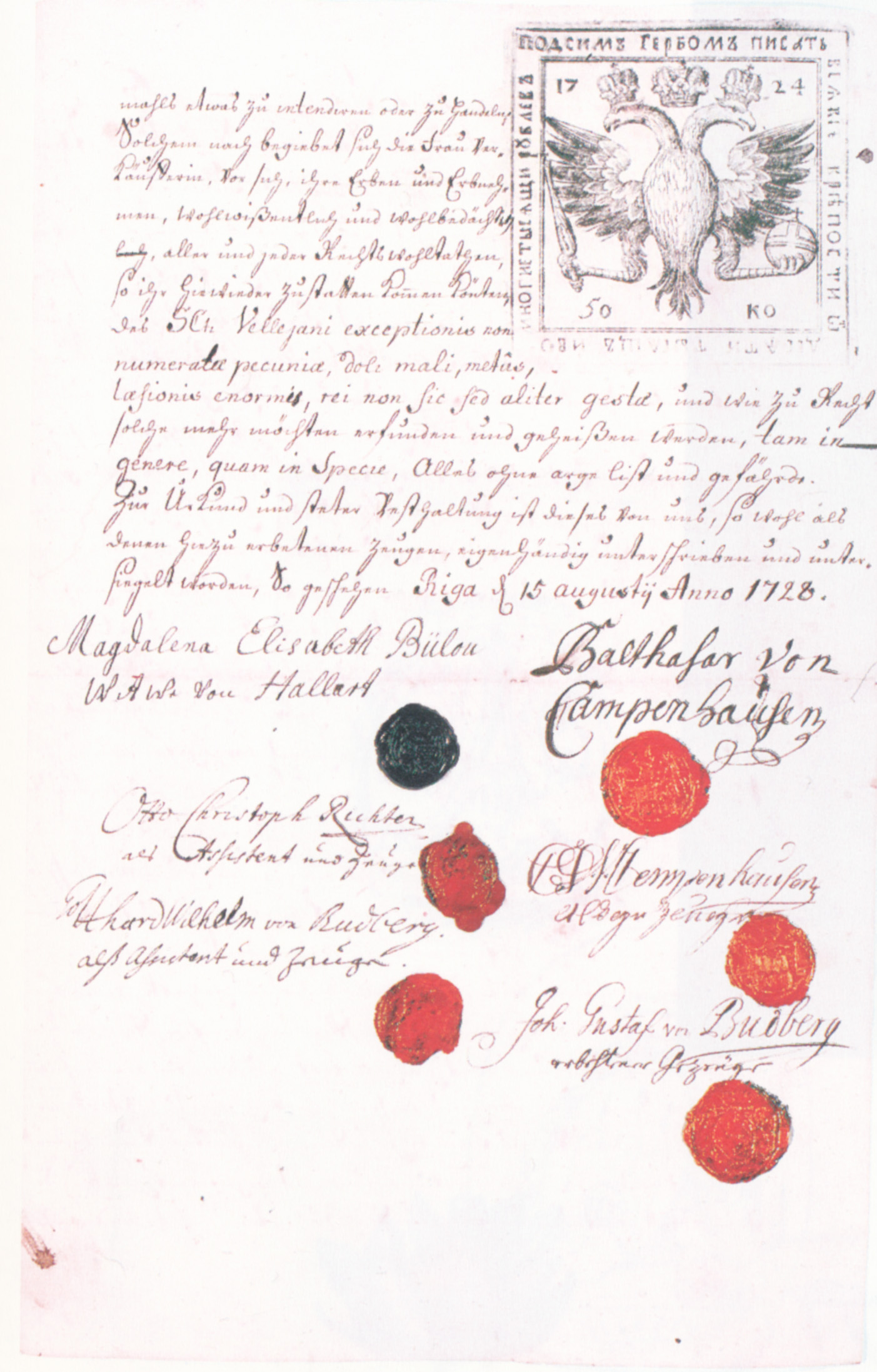 Kaufbrief des Balthasar von Campenhausen über die Güter Orellen und Kudum in Livland Datum: 15.08.1728 Urheber: Balthasar von Campenhausen Quelle: "Gutshof unter den Eichen", Katalog der Ausstellung im Schlossmuseum Rundale und im Herder-Institut Marburg, 1998, S. 103